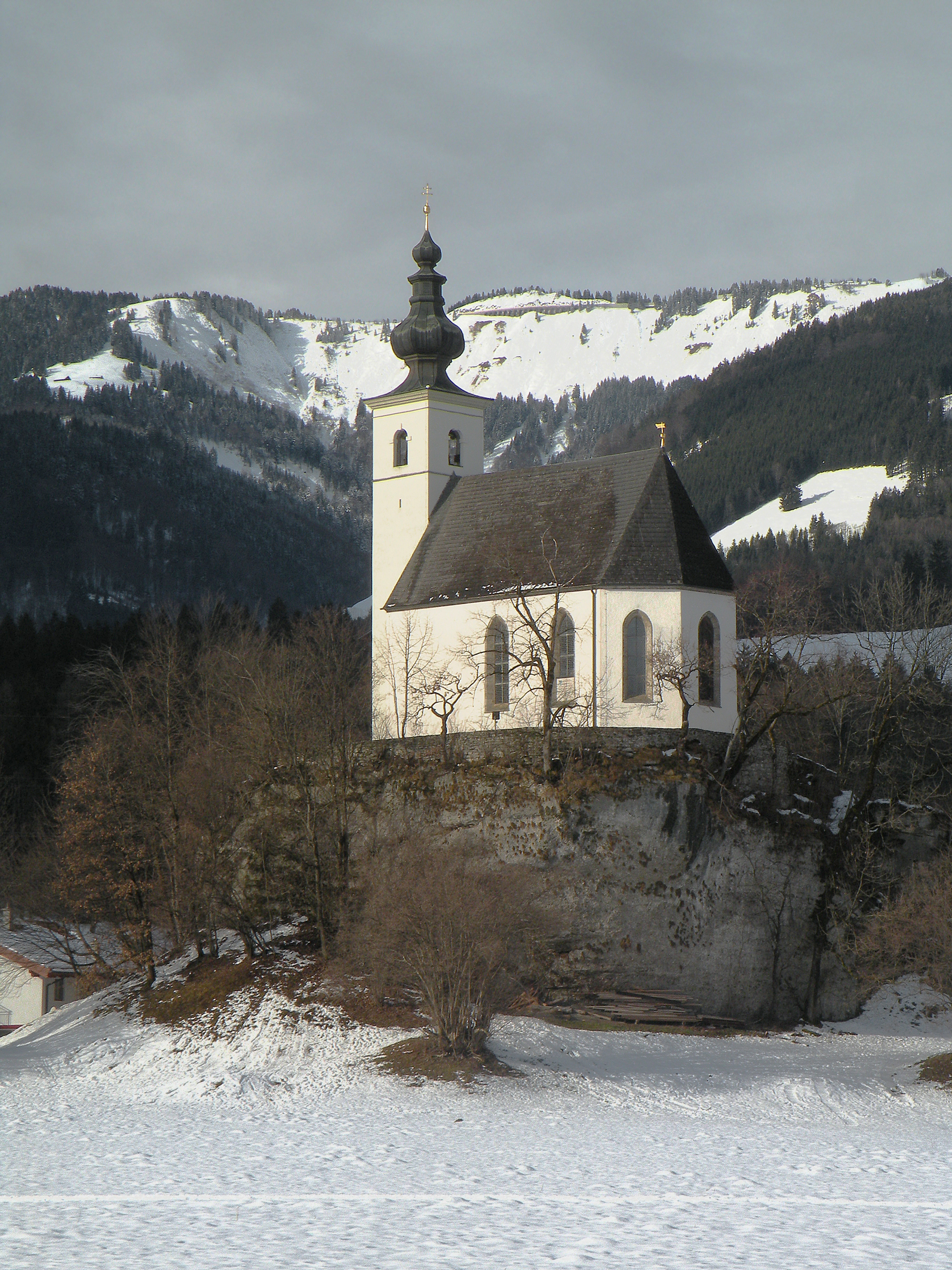 Hagengebirge_und_St.Nicolaus_Kirche